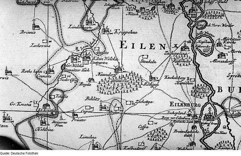 Original image description from the Deutsche Fotothek Ämter Wurzen und Eilenburg. Karte der Ämter Wurzen und Eilenburg, von Schenk, Mitte 18. Jh.